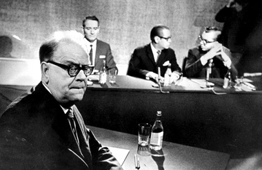 Tage Erlander vid en tv-debatt 1967. Intervjuare är de tre O:na, Gustaf Olivecrona, Åke Ortmark och Lars Orup.